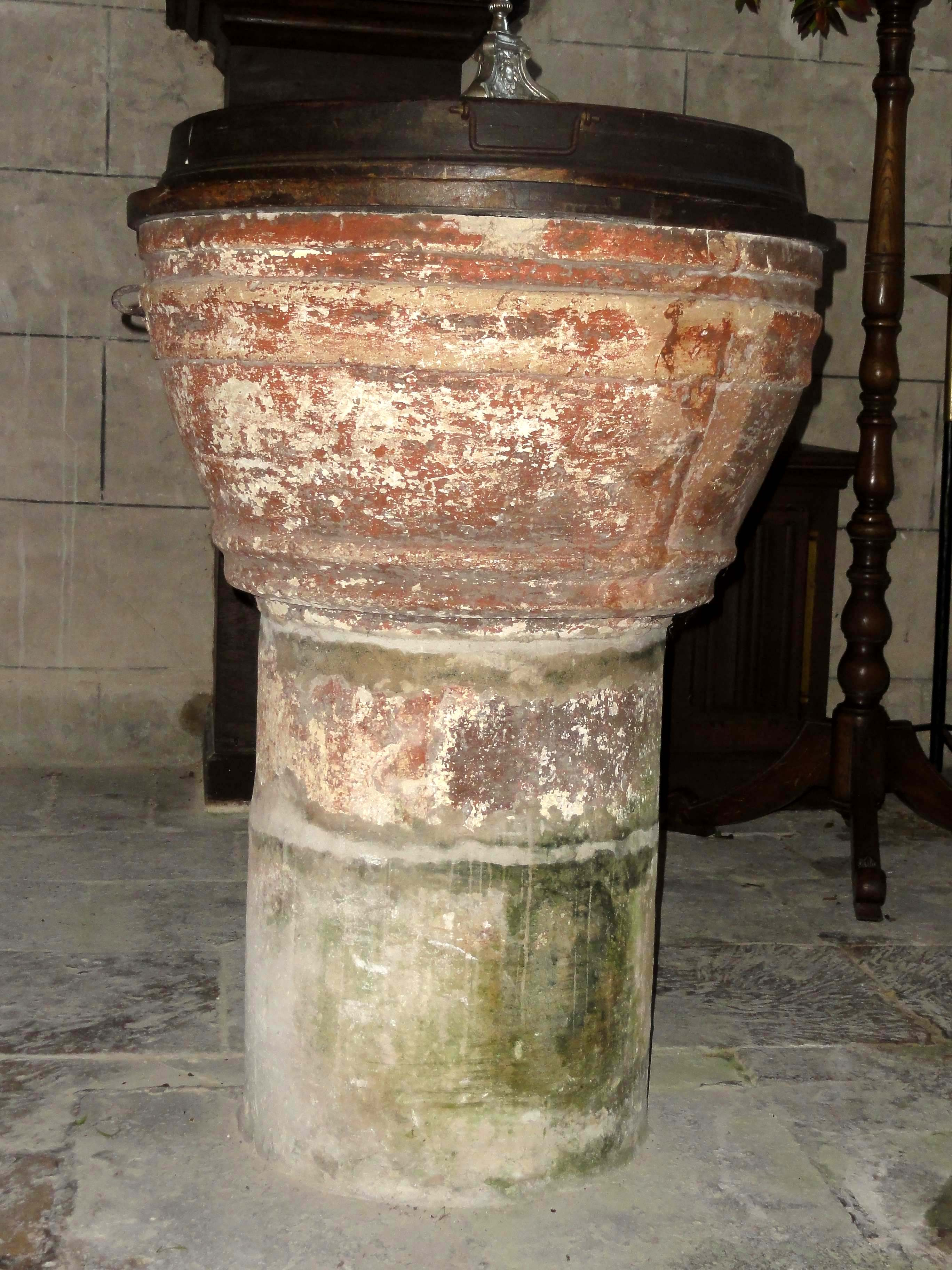 Mobilier de l'église - voir titre.